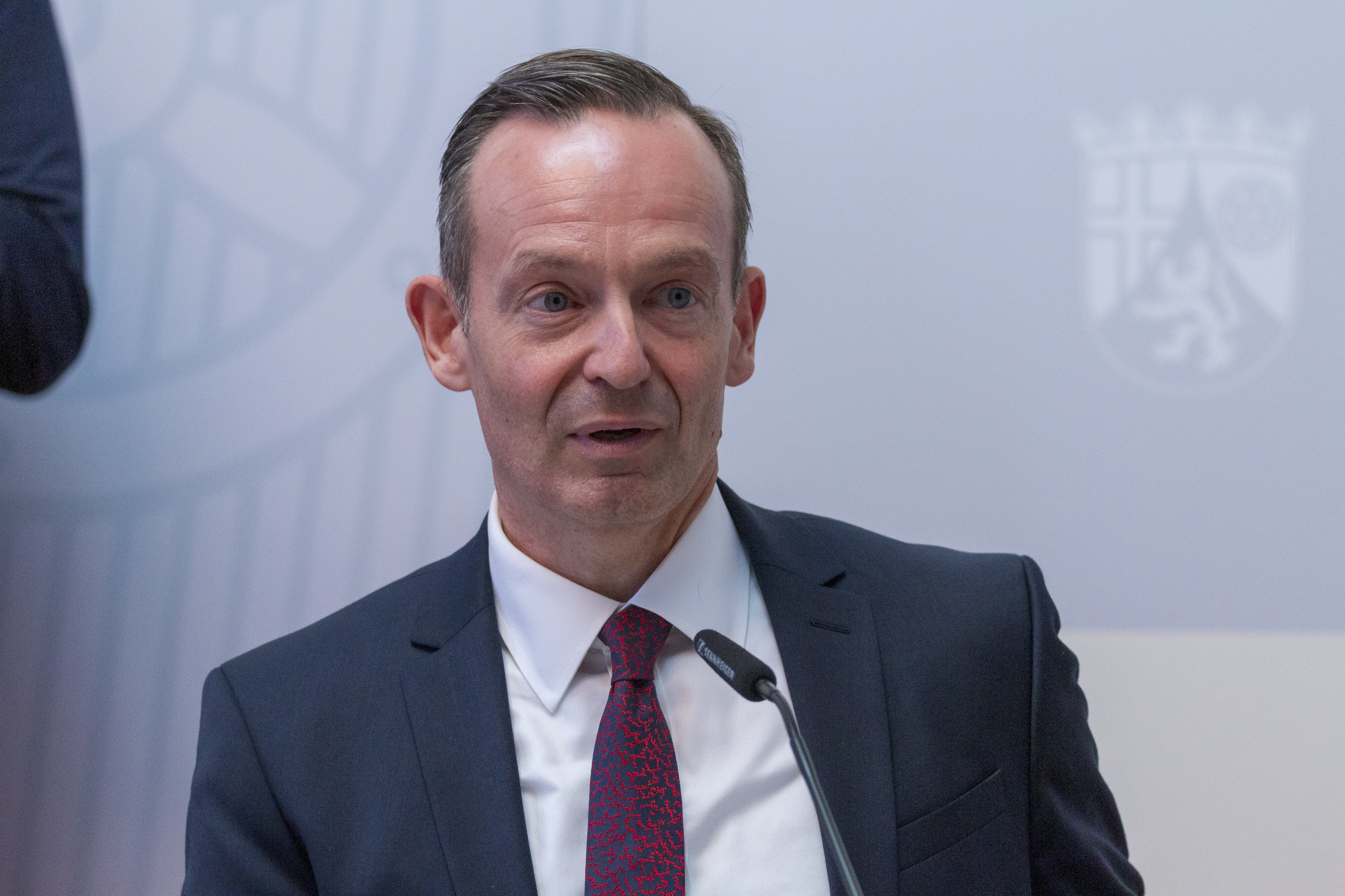 Pressekonferenz der rheinland-pfälzischen Landesregierung am 18. August 2020 in der Staatskanzlei: Volker Wissing, Wirtschaftsminister